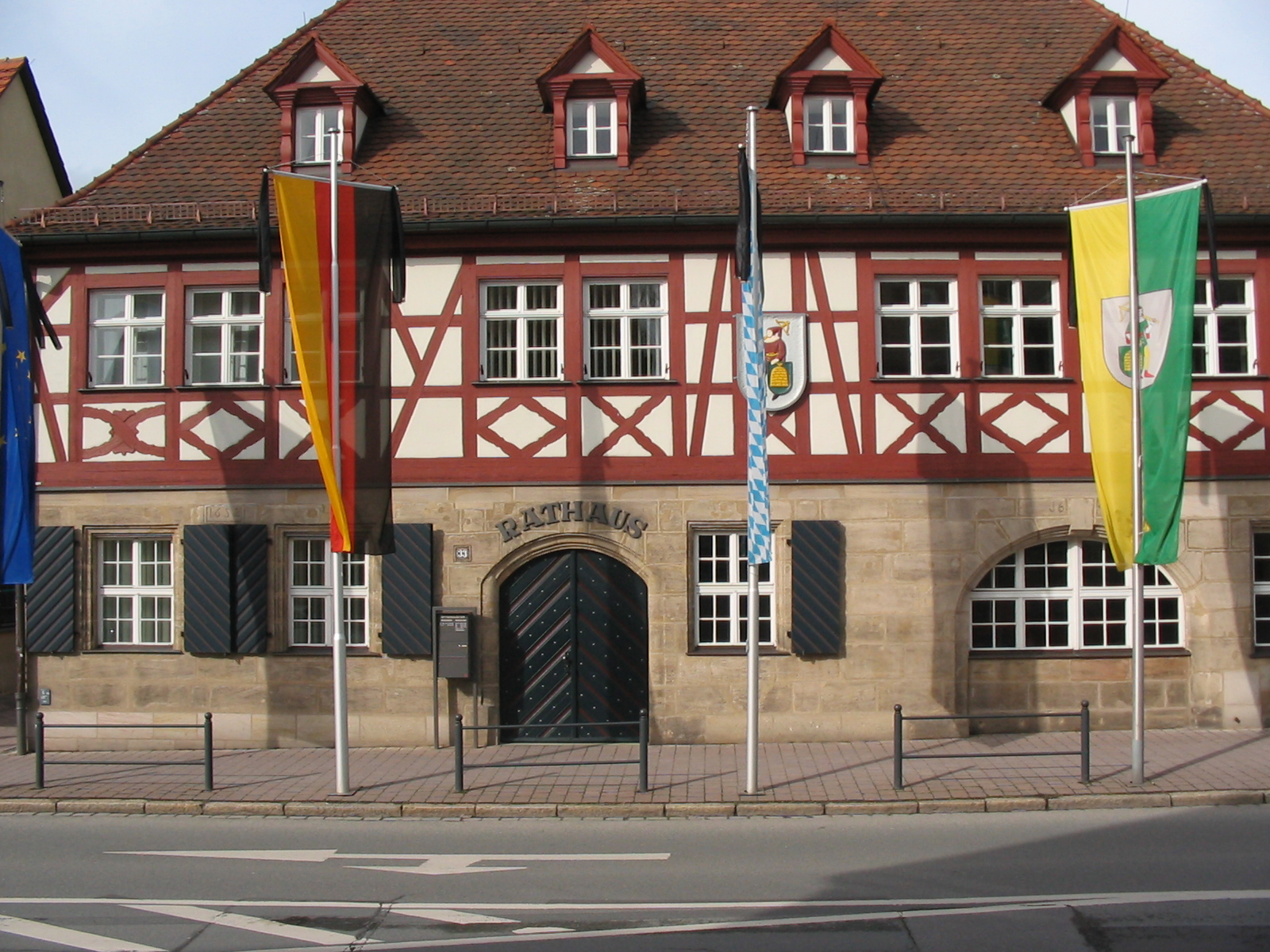 Rathaus Markt Feucht